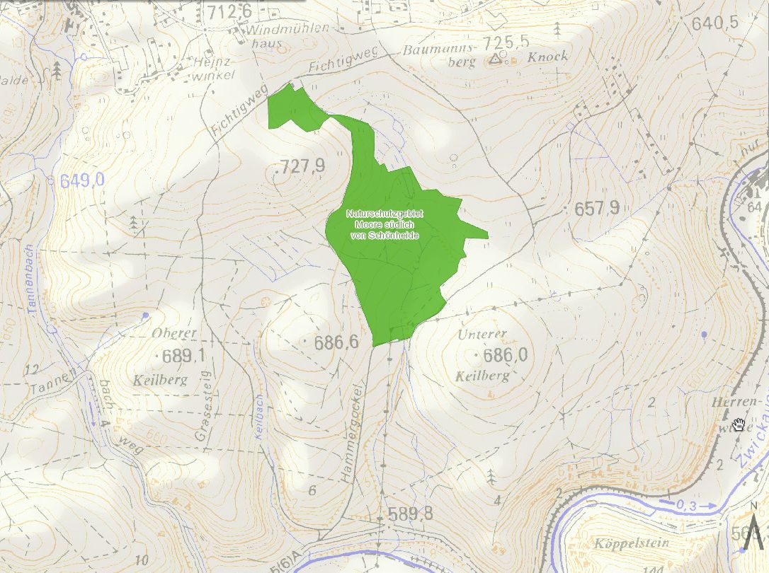 Schönheide im Erzgebirge: Das Ende 2013 neu ausgewiesene Naturschutzgebiet „Moore südlich von Schönheide“ hat eine Fläche von 27,83 Hektar. Hier in der Kartendarstellung im Maßstab 1:10.000 des Bundesamts für Naturschutz [1], abgerufen am 13. September 2015. Das Schutzgebiet umfasst das frühere Naturschutzgebiet Baumgärtels Kiefern sowie weitere Fächen. Basis der Unterschutzstellung ist die sehr informative 100seitige naturschutzfachliche Würdigung vom Januar 2012 durch ein Hallesches Fachbüro für Ökologie und Naturschutz. Wortlaut des Gutachtens, veröffentlicht vom Naturpark Erzgebirge Vogtland, abgerufen am 13. September 2015